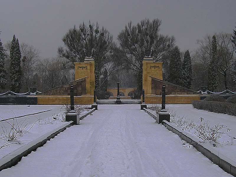 Пагорб Слави (російський військовий цвинтар) у Львові, Україна